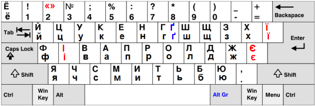 Windowsのウクライナ語キーボード